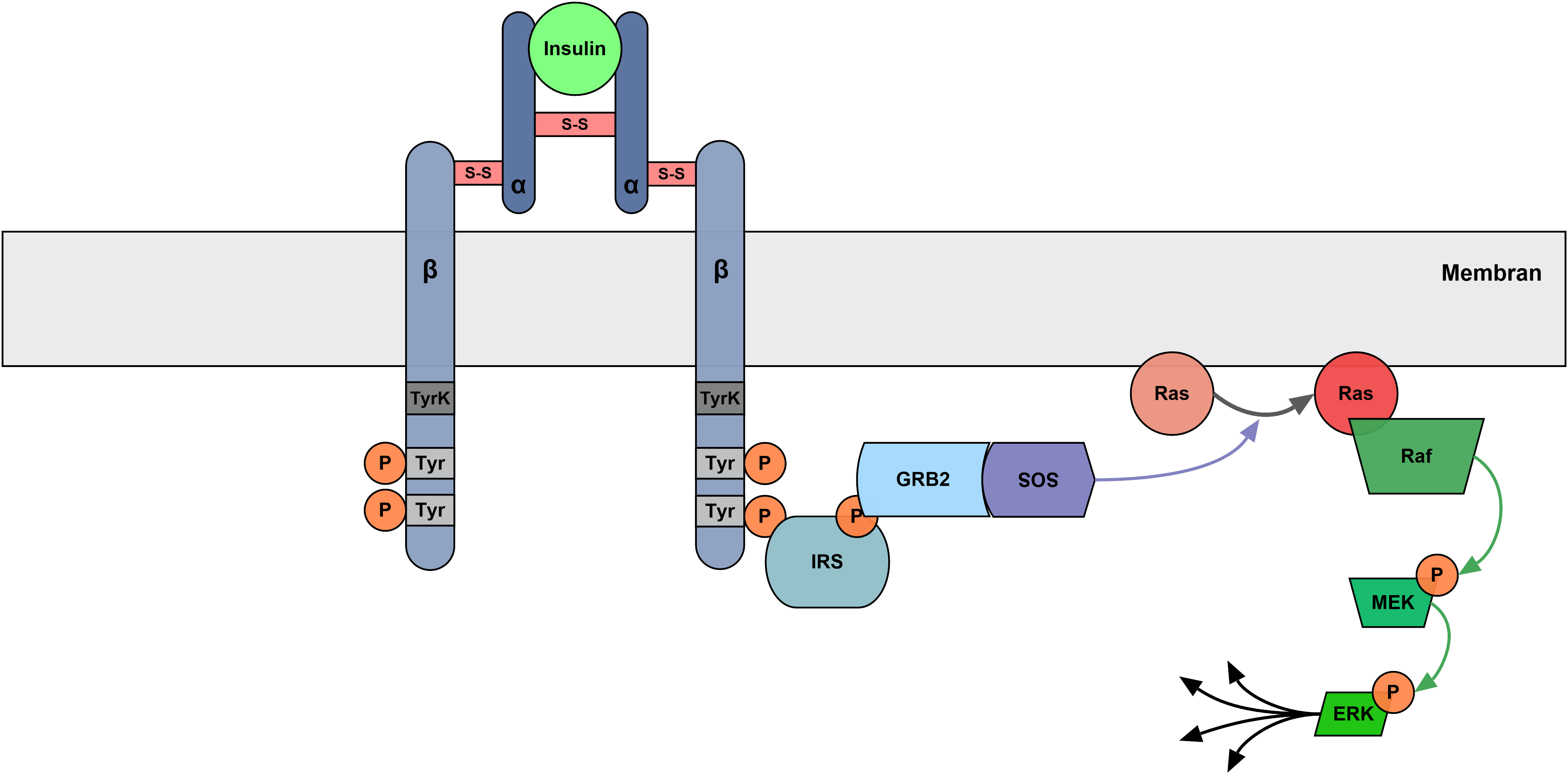 Ras - Signalweg ausgelöst durch Insulinrezeptor